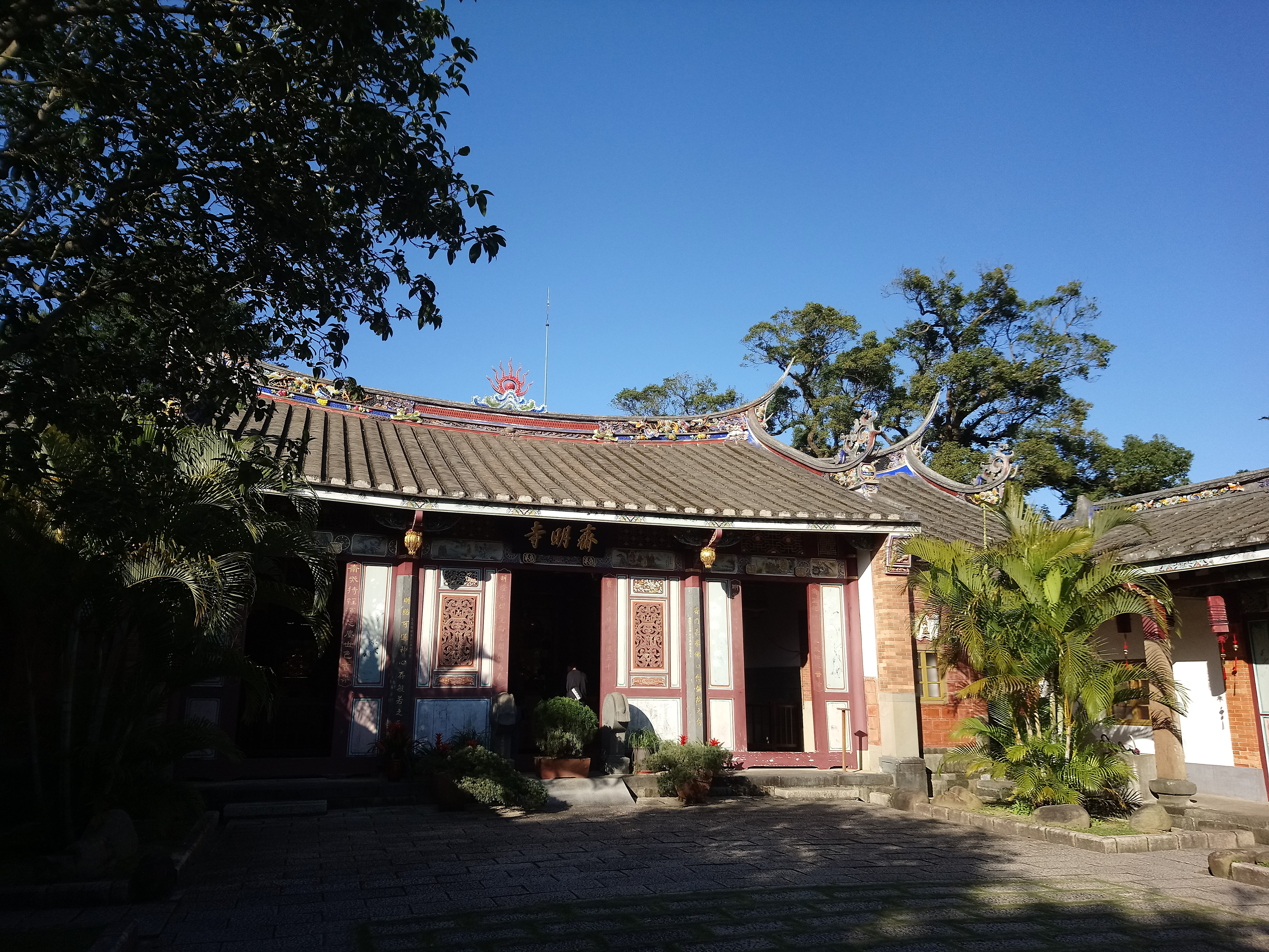 大溪齋明寺近景,桃園市大溪區光明里